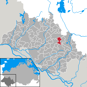 Lüblow in Mecklenburg-Vorpommern - district Ludwigslust